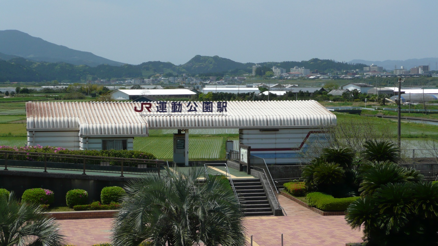 運動公園駅（日南線、日本）